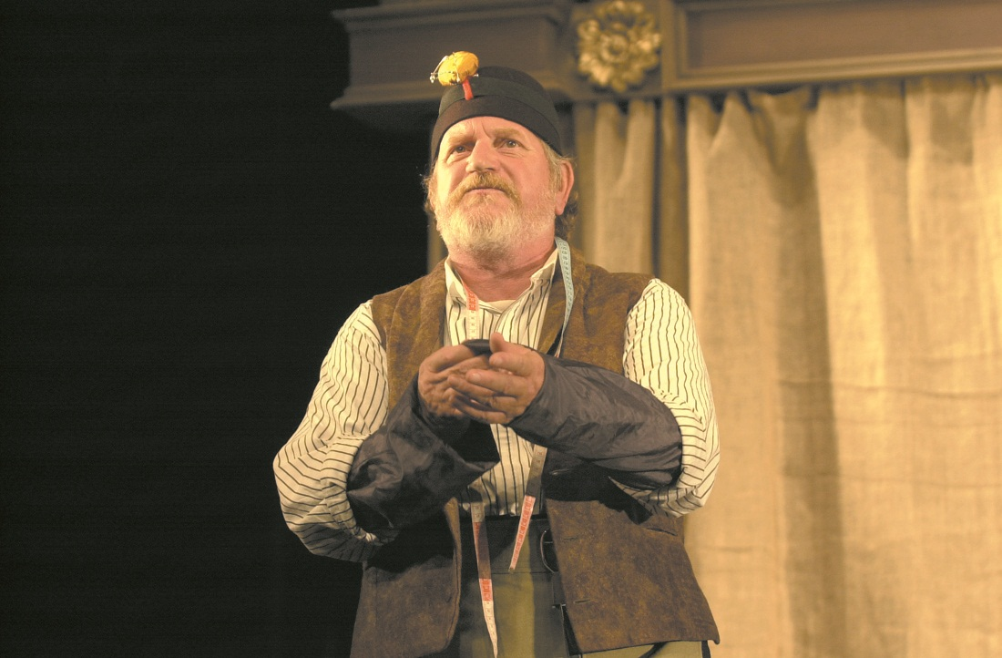 יבגני גמבורג בהצגה אופרה בגרוש, תיאטרון גשר